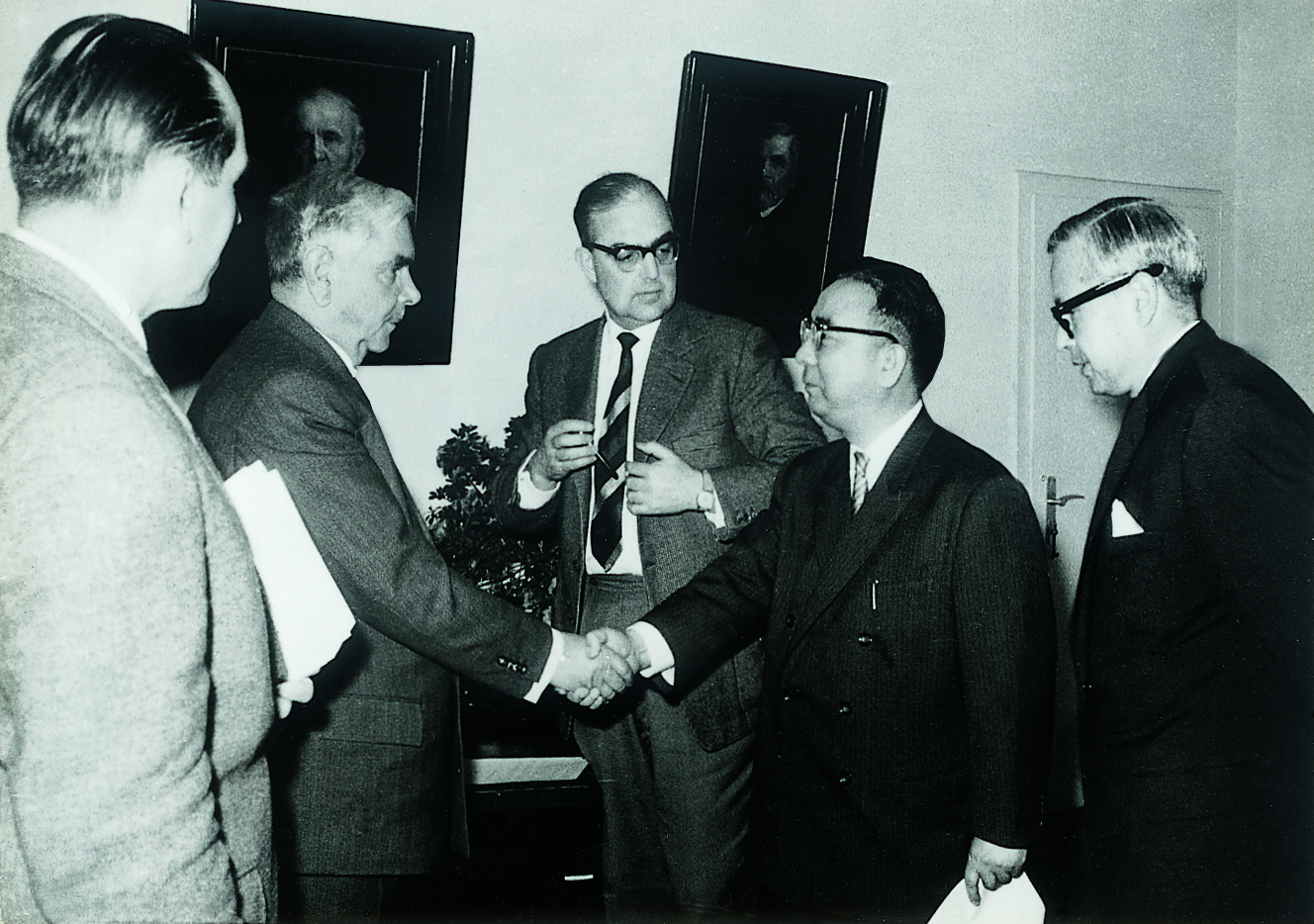 Abschluss des Vertrages zwischen Freudenberg und NOK im Jahr 1960. Von links: Dr. Helmut Fabricius, Richard Freudenberg, Dr. Hans Erich Freudenberg, Shogo Tsuru, Dr. Kurt Brasch.